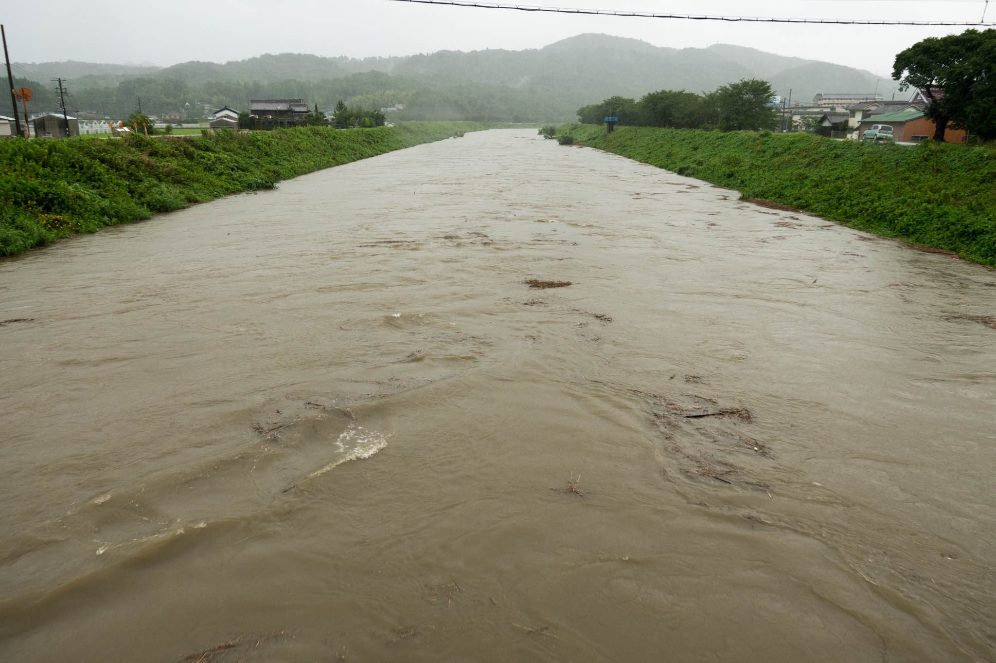 平成27年台風11号豪雨